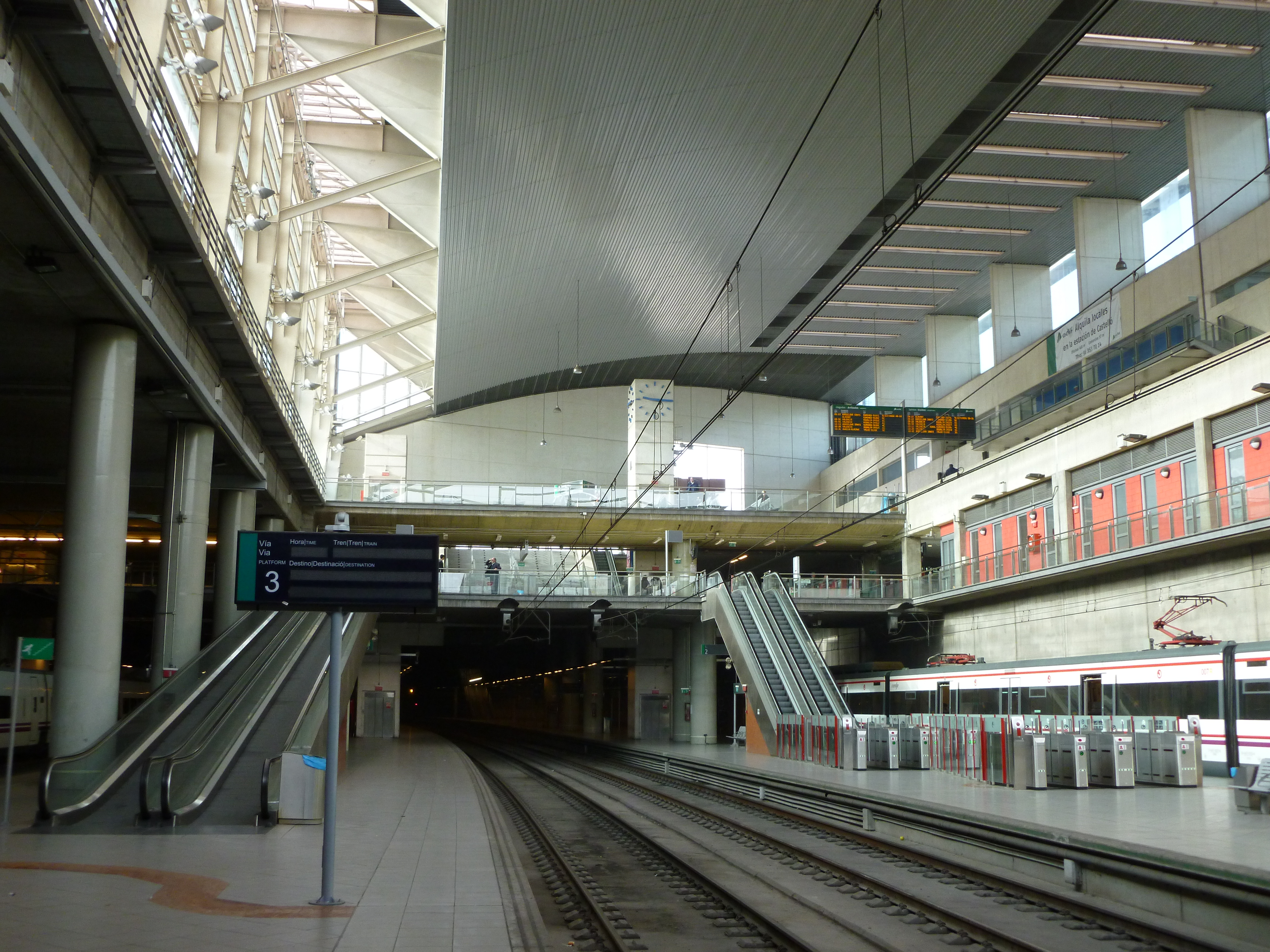 Interior de la estación de ferrocarriles de Castellón de La Plana, vista desde el andén de la vía 3 en dirección sur.